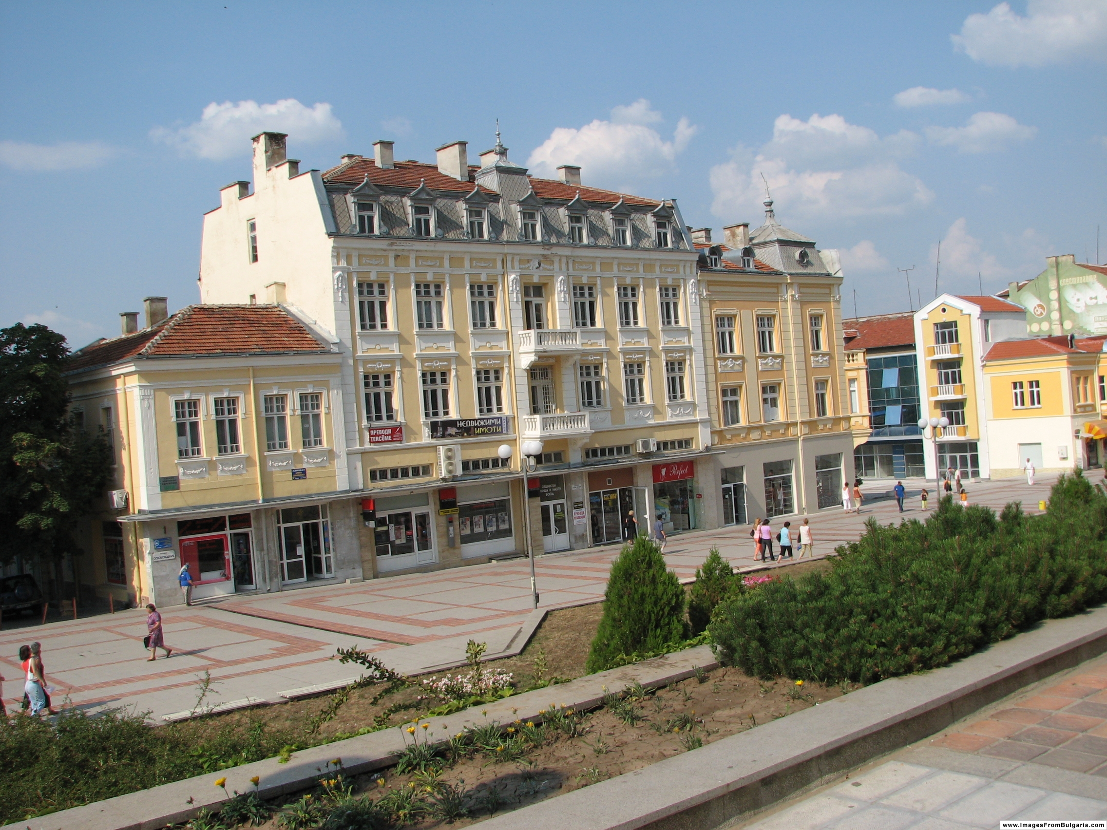 Central Shumen, Bulgaria